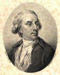 August Adolph Friedrich Hennings (1746-1826), embedsmand